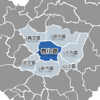 台南市善化區相對位置